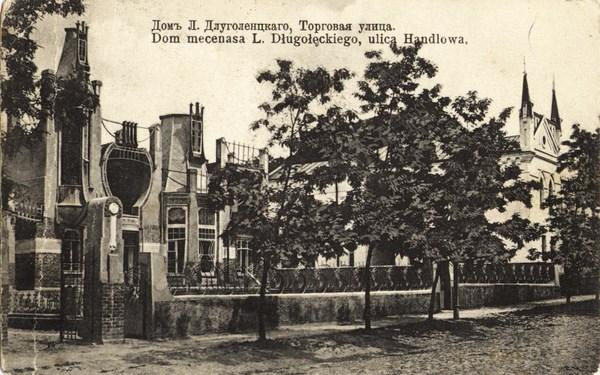 Будинок капітана Длуголенського, нині Вінницька дитяча художня школа, пам'ятка архітектури